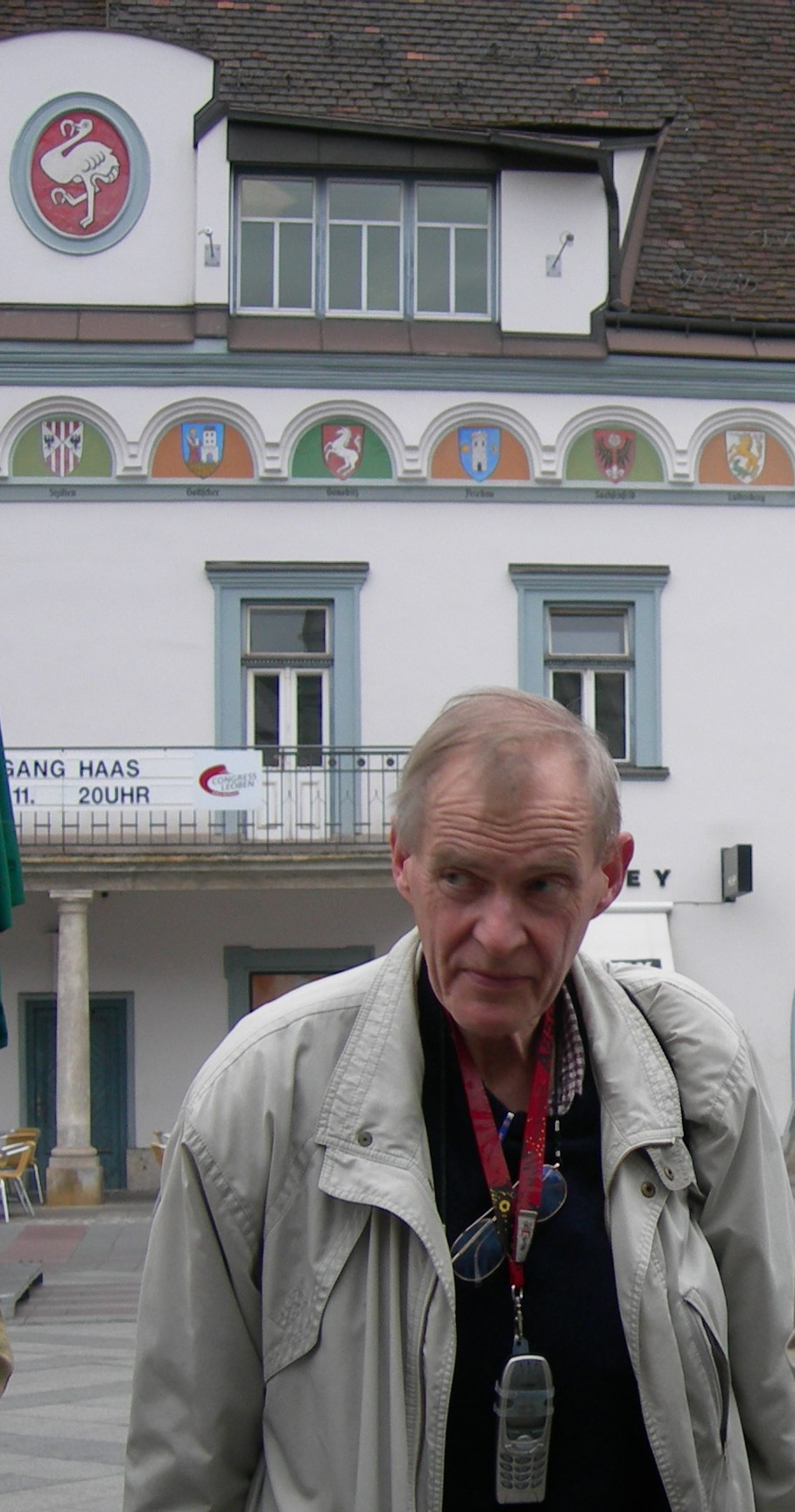 Prof. Dr. Klaus Lederer, 63 Jahre alt, während einer Tagung der Montanistischen Universität vor dem Alten Rathaus mit dem Stadtwappen in Leoben